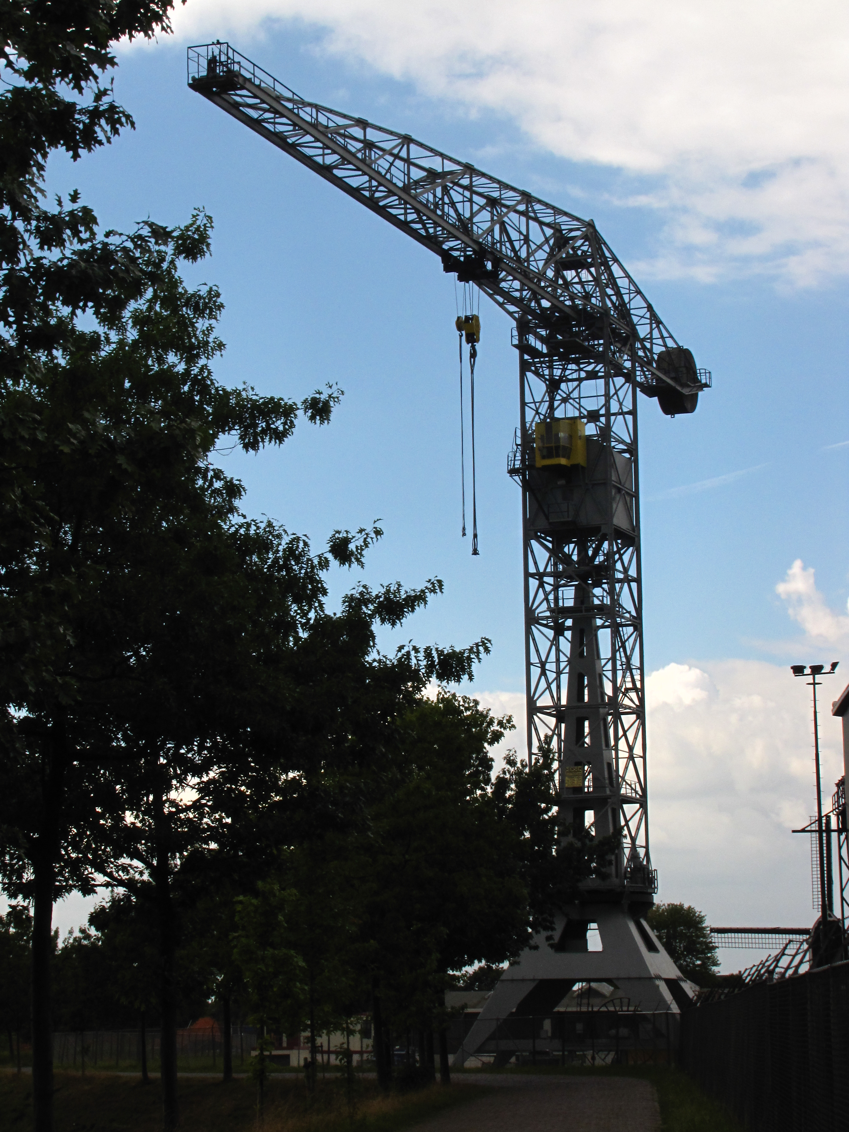 Een nog in gebruik zijnde Hensen-kraan in de haven van Oud-Heusden (Noord Brabant)